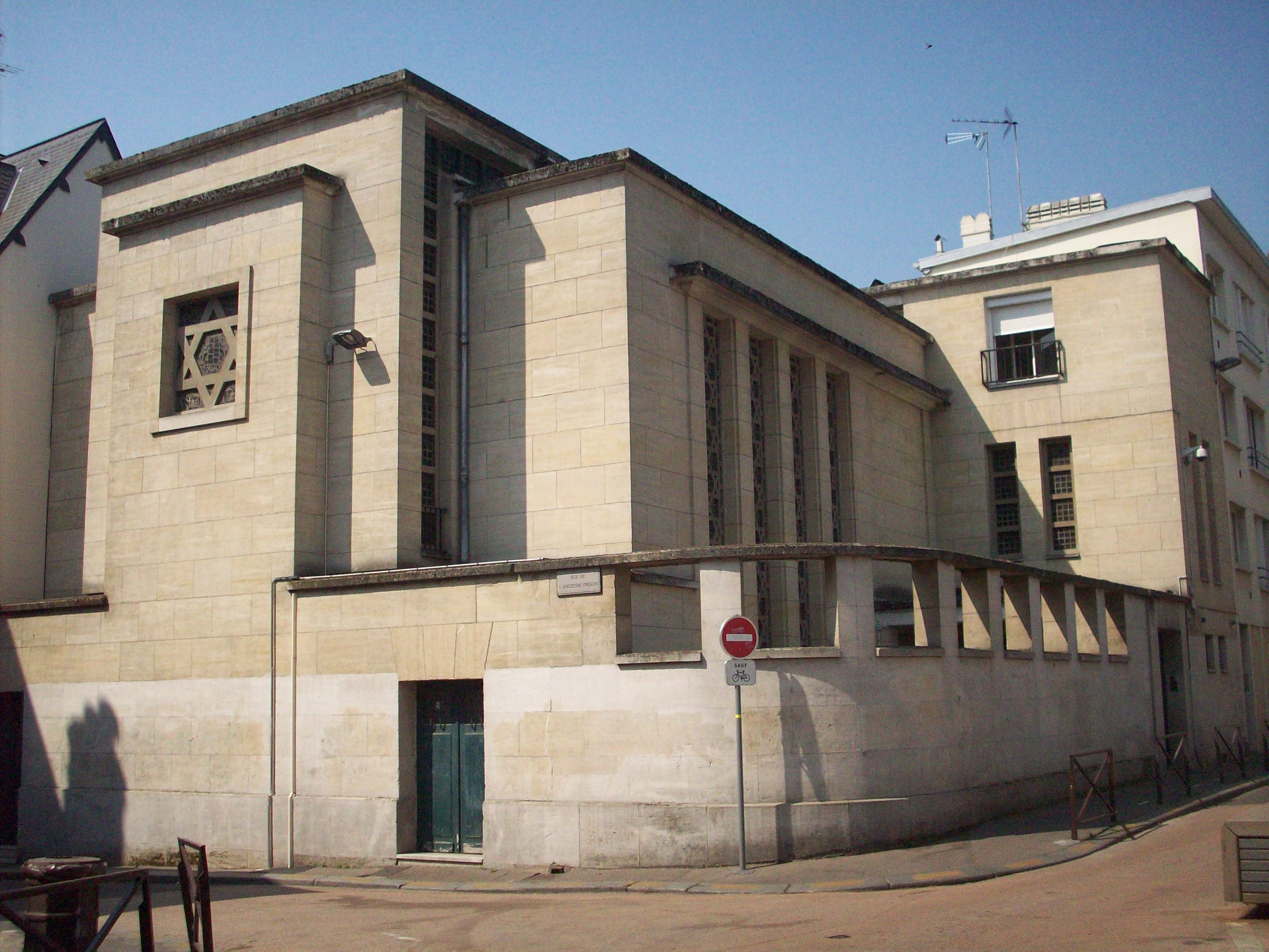 Synagogue rue des Bons-Enfants.